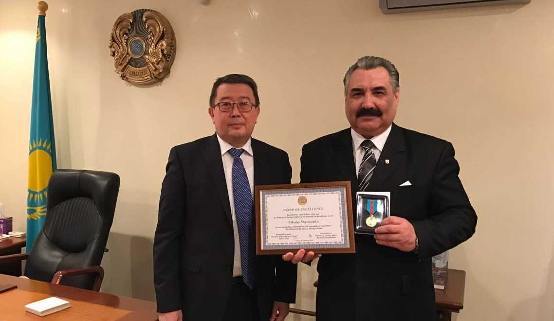 Фото під час нагородження